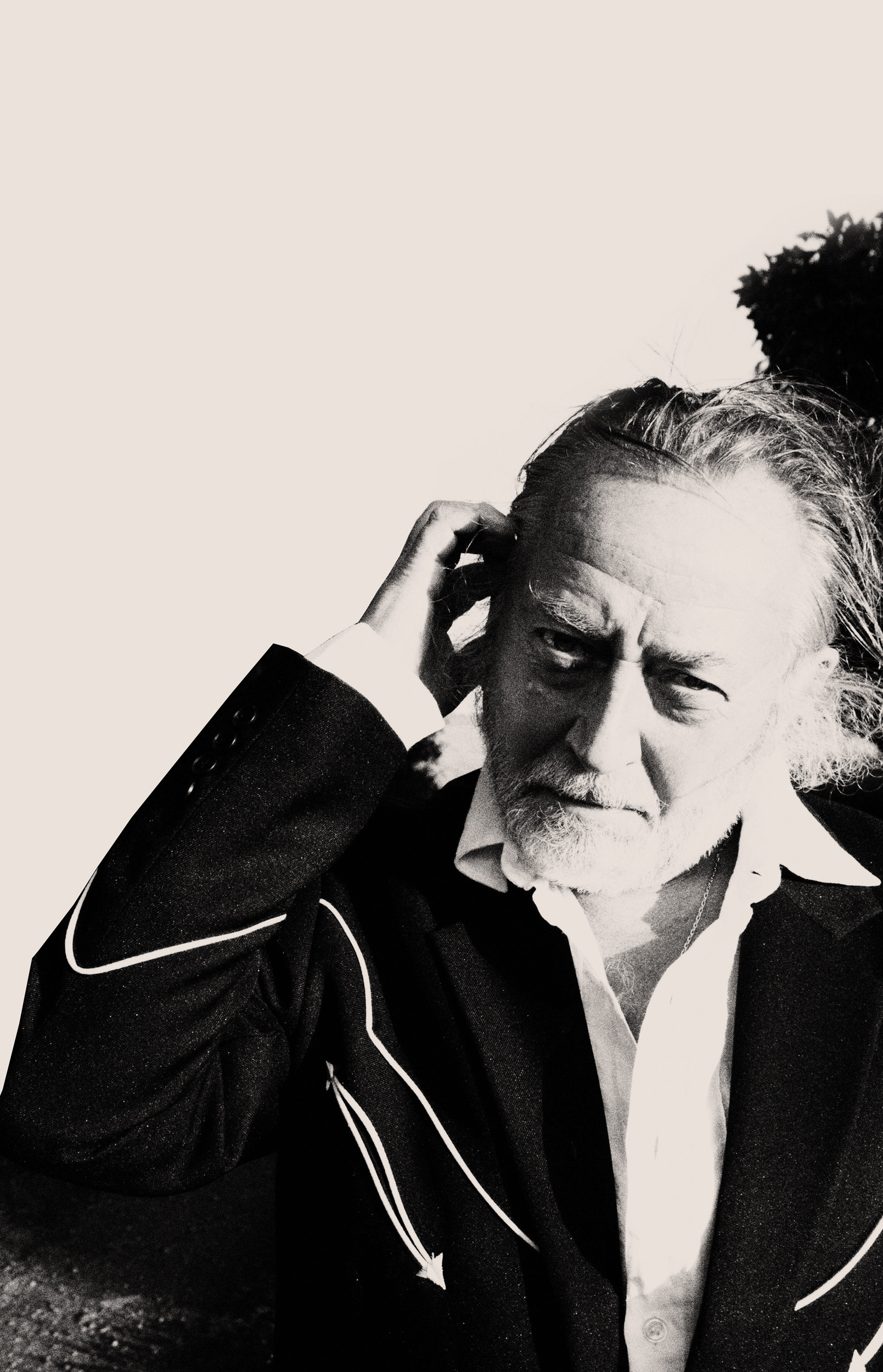 Artisten Ulf Lundell.